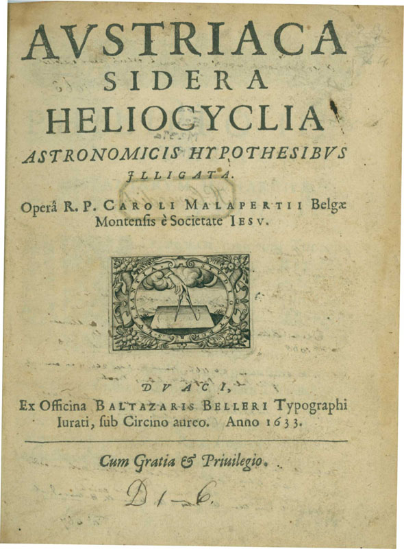 Portada de "Austriaca Sidera Heliocycla" (1633), obra de Charles Malapert